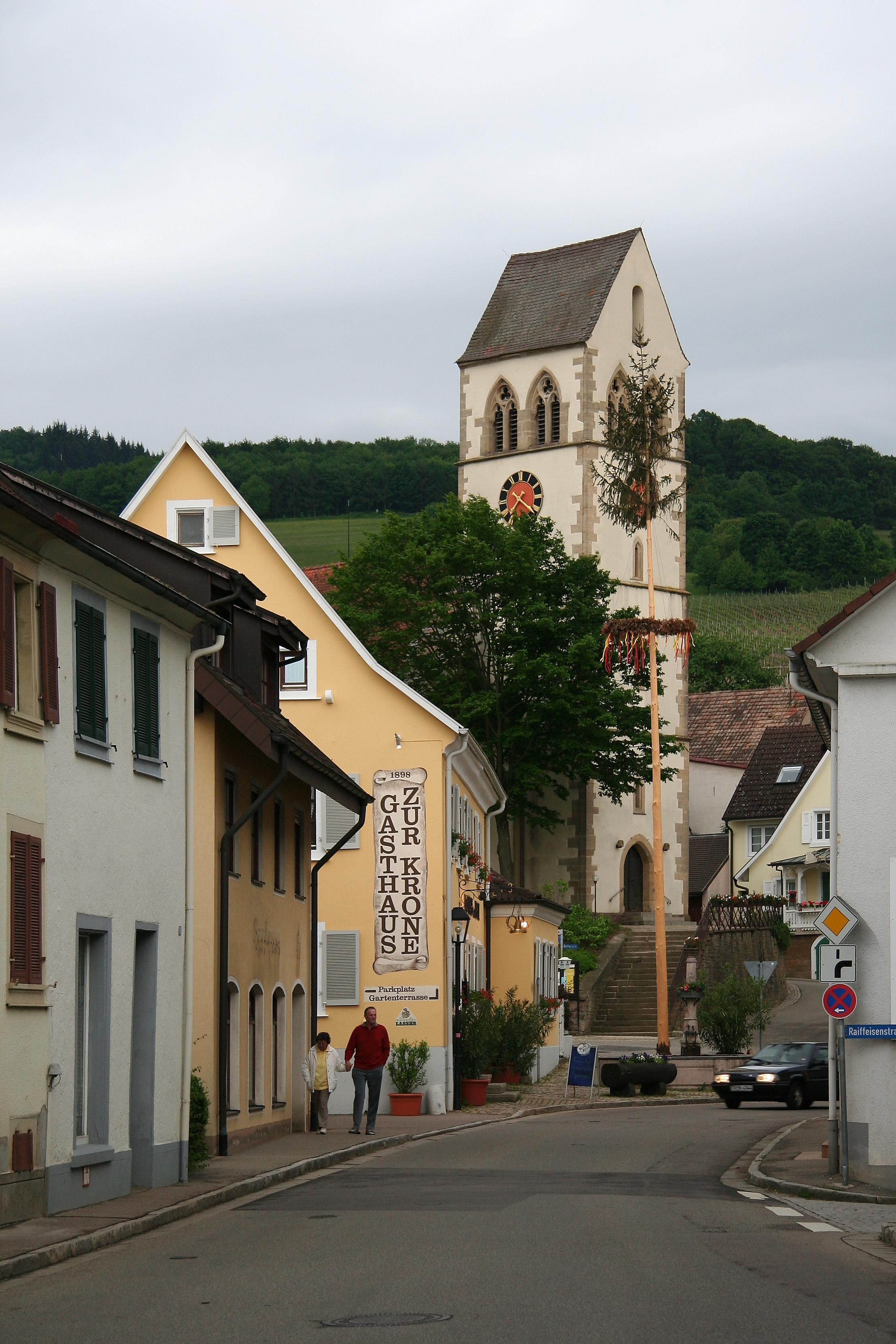 Kirchturm von St. Johannes aus der Bugginger Straße, Britzingen / Müllheim